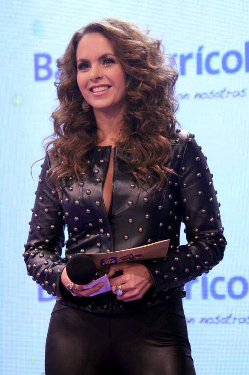 Lucero cantora atriz e apeentadora Mexicana